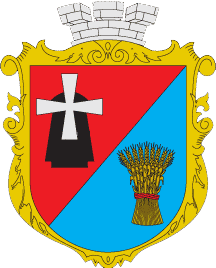 Герб Іваничівського району